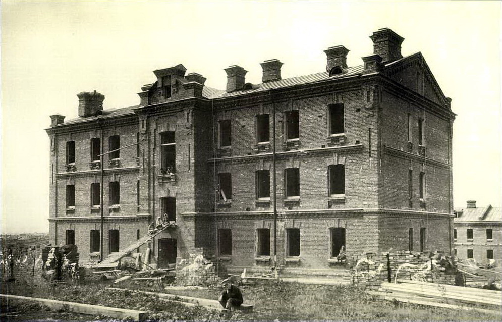 Строительство жилого дома для двенадцати младших холостых офицеров в Военном городке Новониколаевска (совр. Новосибирск) в 1913 году.